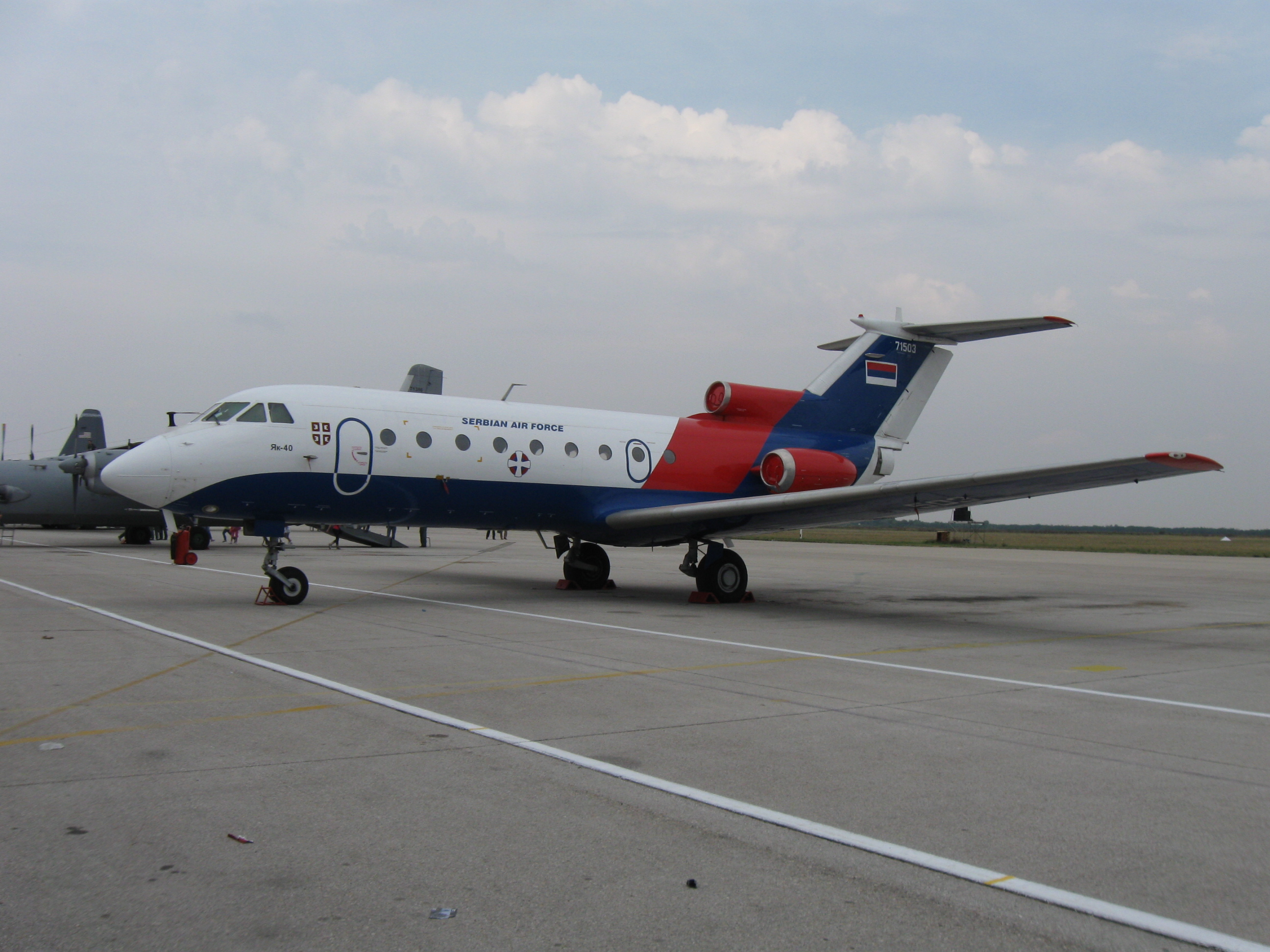 Слика авиона Јак-40. Творац слике је SmirnofLeary и предаје је у јавно власништво. Слика је направена 13. септембра 2009. године на аеромитингу у Батајници. Кропована (исечена) је у Фотошопу како би се избацили непотребни делови фотографије.